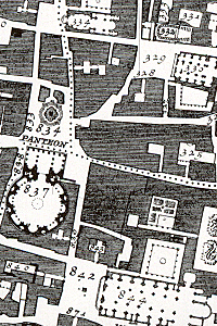 Detalle del mapa Nolli (mapa de Roma por Giambattista Nolli); fotomontaje retocado